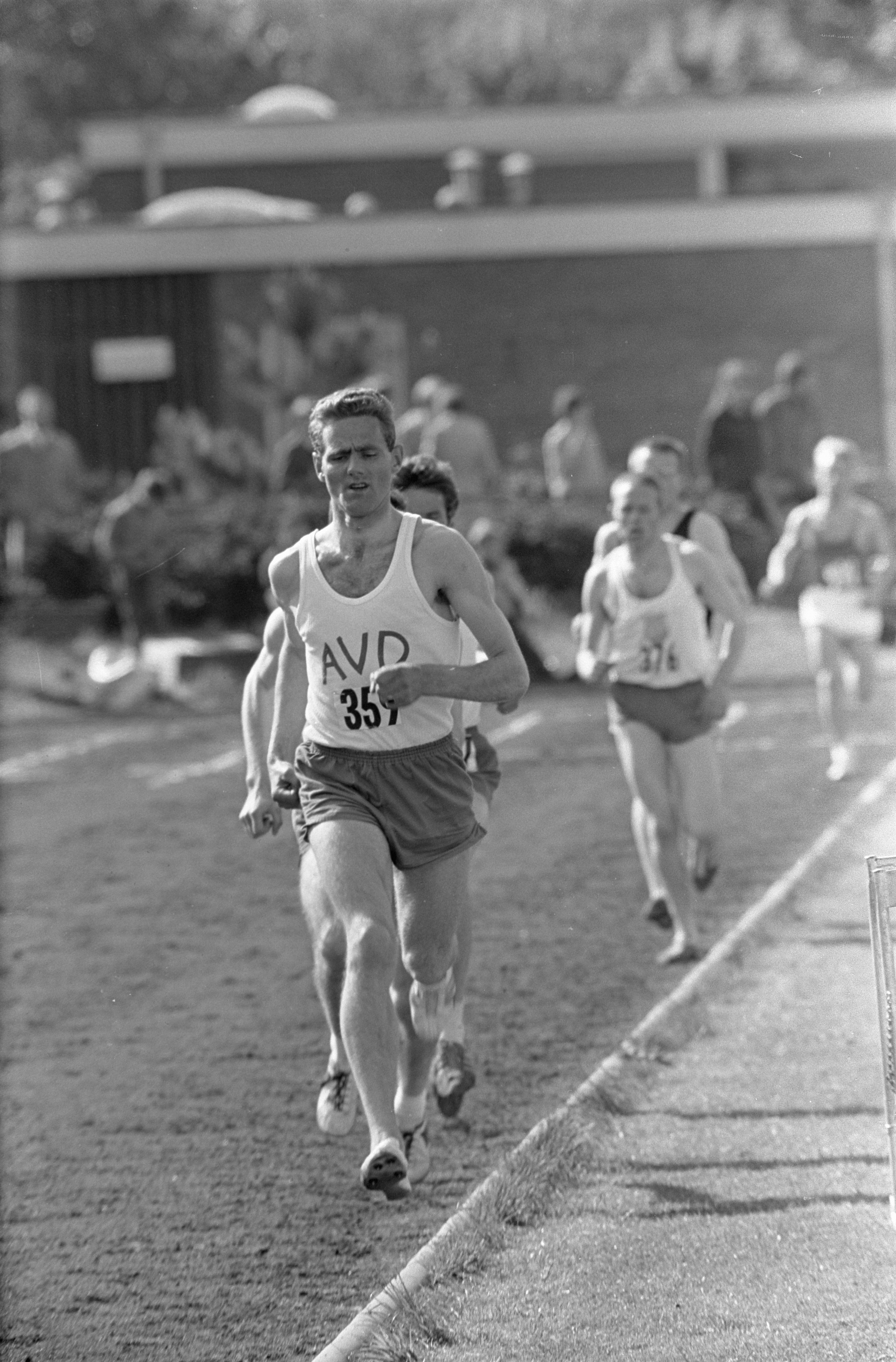 Collectie / Archief : Fotocollectie Anefo Reportage / Serie : [ onbekend ] Beschrijving : Nationale Atletiekwedstrijden te Lisse Annotatie : Egbert Nijstadt. 3 km? Datum : 19 mei 1968 Locatie : Lisse Trefwoorden : atletiekwedstrijden Persoonsnaam : Nijstadt, Egbert Fotograaf : Kroon, Ron / Anefo, [onbekend] Auteursrechthebbende : Nationaal Archief Materiaalsoort : Negatief (zwart/wit) Nummer archiefinventaris : bekijk toegang 2.24.01.05 Bestanddeelnummer : 921-3635